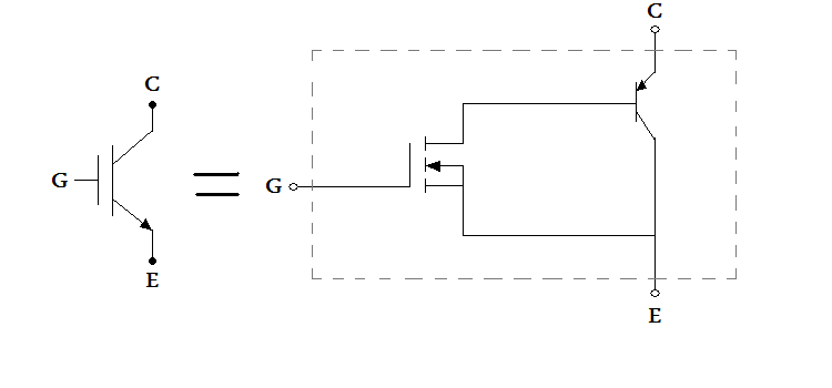 Ilustracja przedstawia schemat zastępczy tranzystora IGBT.Schemat jest mojego autorstwa. Data wykonania:6.06.2007